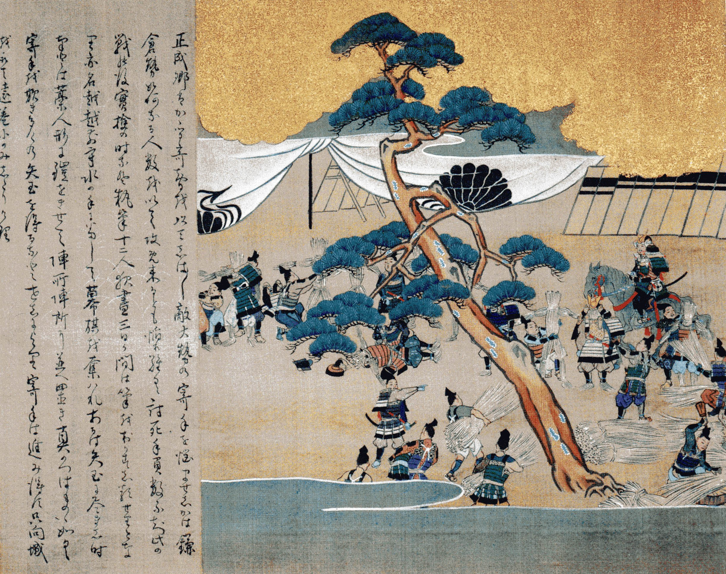 わら人形の策